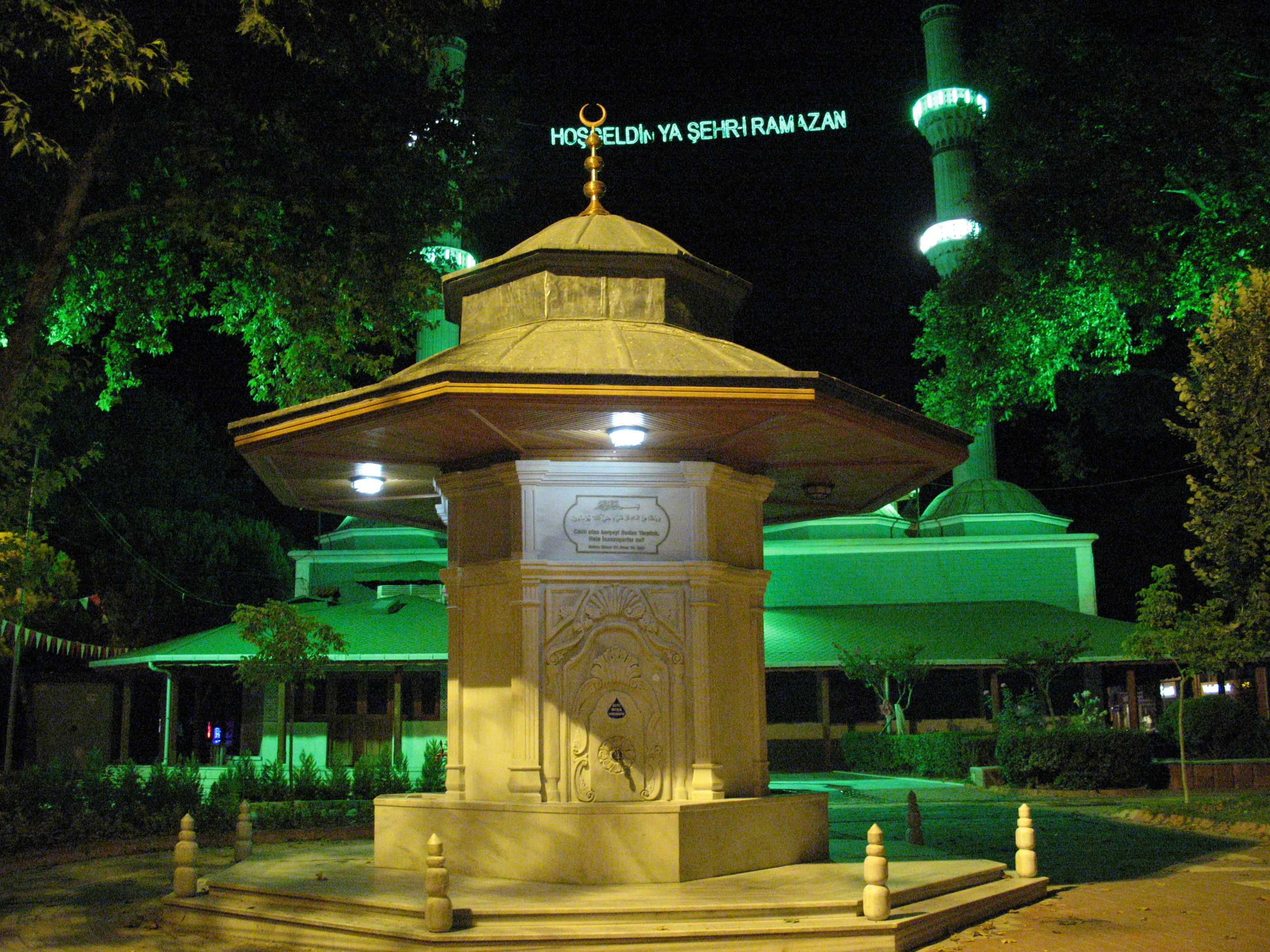 çağdaş ve modern gönen ve halkına hizmet vermeye çalışan ve direnen tarihi eser ozellikleri bakimindan korunmasi gereken camilerimizden gönen merkaz cami balıkesir. by ismail soytekinoğlu